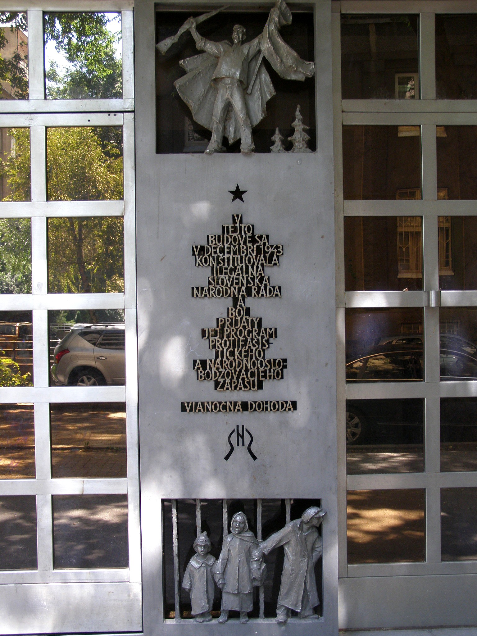 Gajova ul. č. 11. Pamätná tabuľa tzv. Vianočnej dohody Object location48° 08′ 38.04″ N, 17° 07′ 03.36″ E